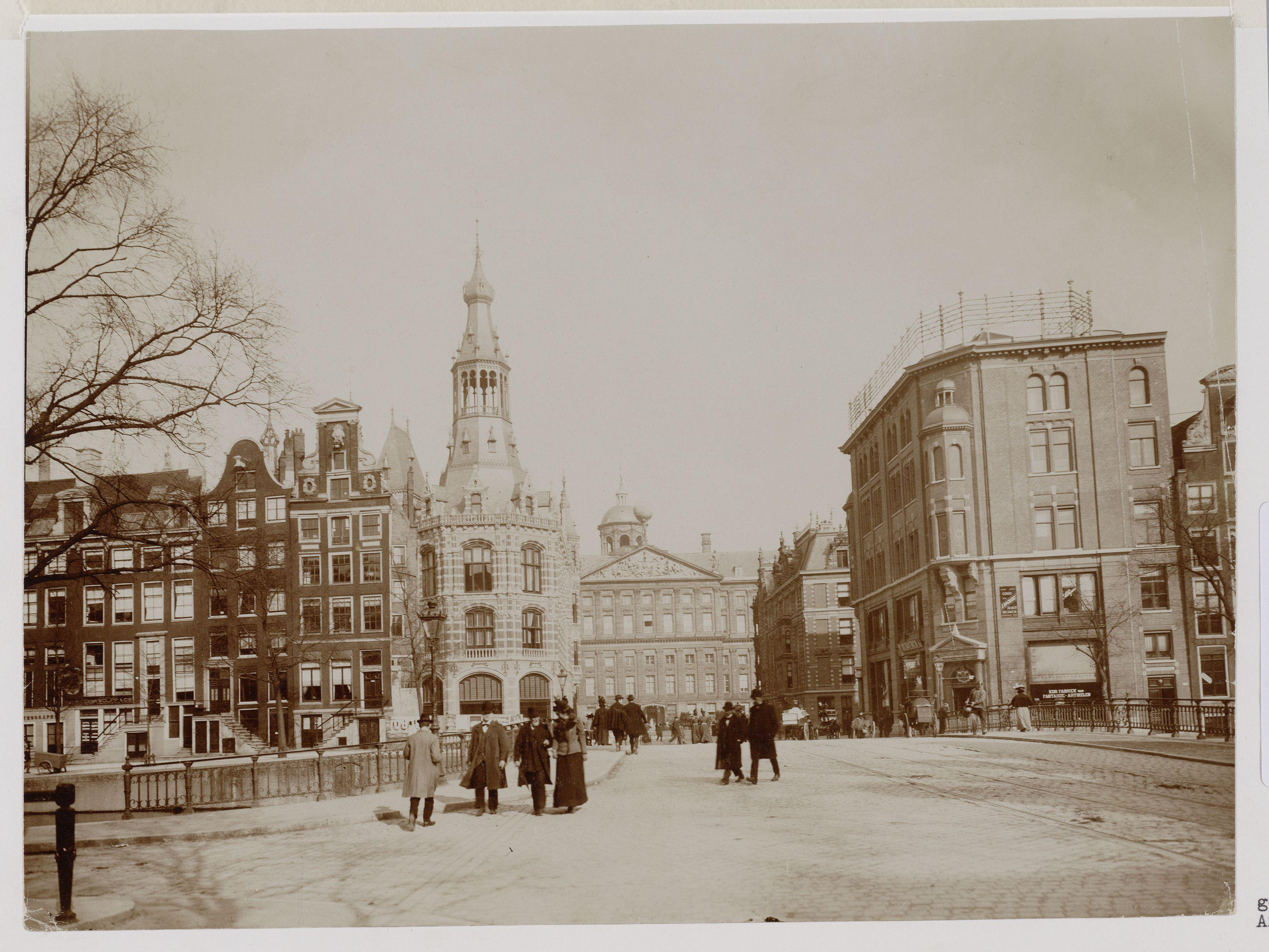 Raadhuisstraat ter hoogte van het Singel. Foto. Amsterdam, Stadsarchief Amsterdam, collectie foto-afdrukken